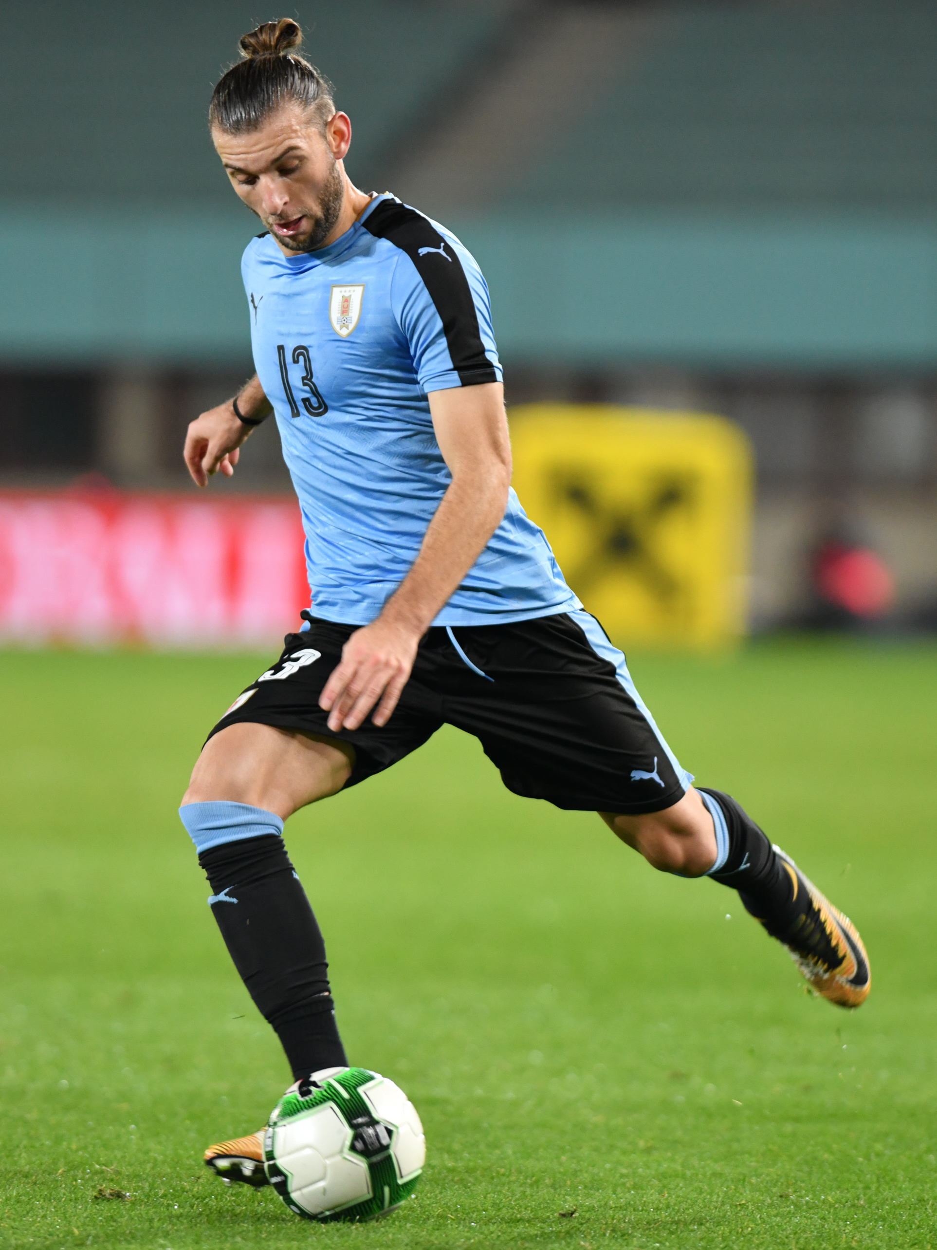 Wien, Österreich, 14.11.2017, Sport, Fussball, OEFB Freundschaftliches Laenderspiel - Österreich vs Uruguay. Bild zeigt Gaston Silva (URU).